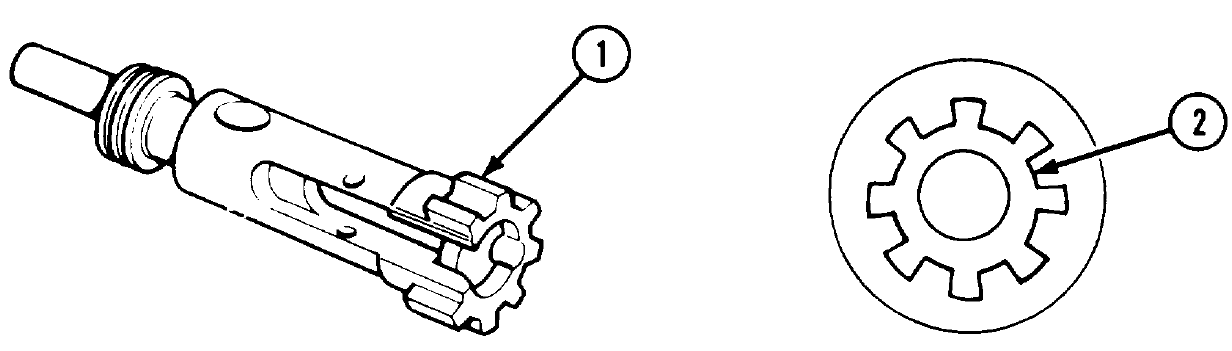 M16 rifle bolt and barrel extension locking lugs